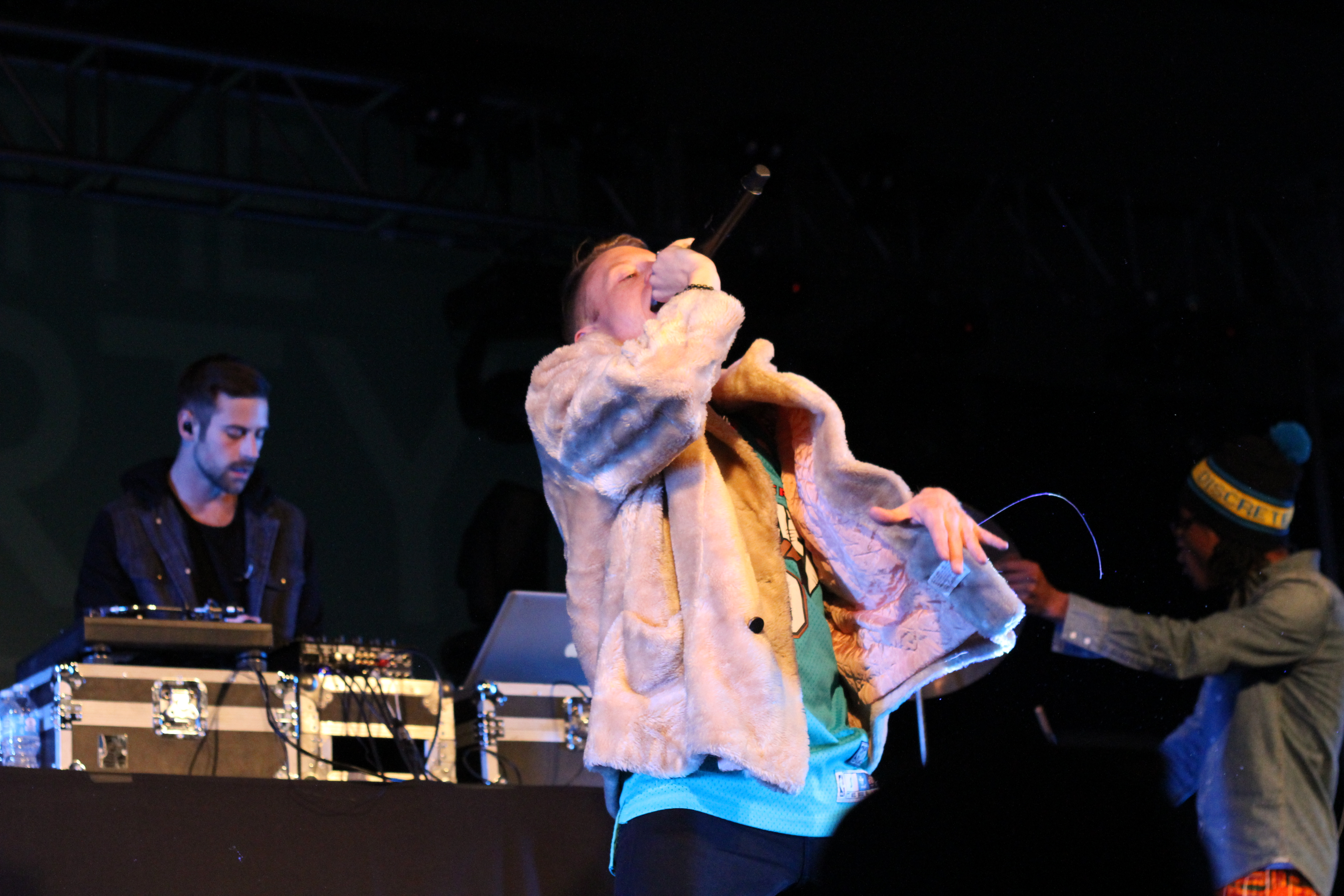 By Amanda Rhoades